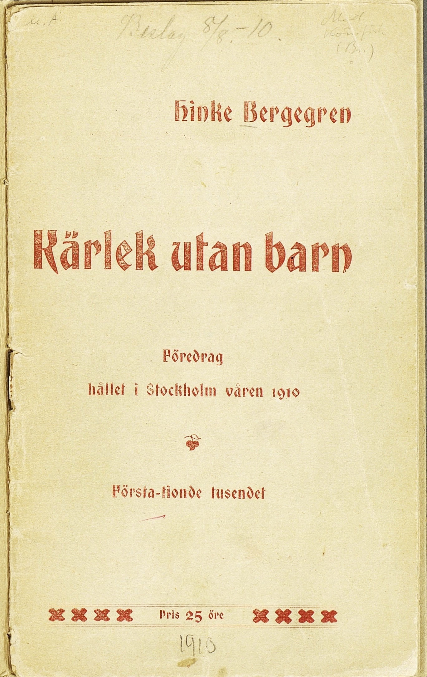 Försättsbladet till Hinke Bergegrens föredrag Kärlek utan barn 1910